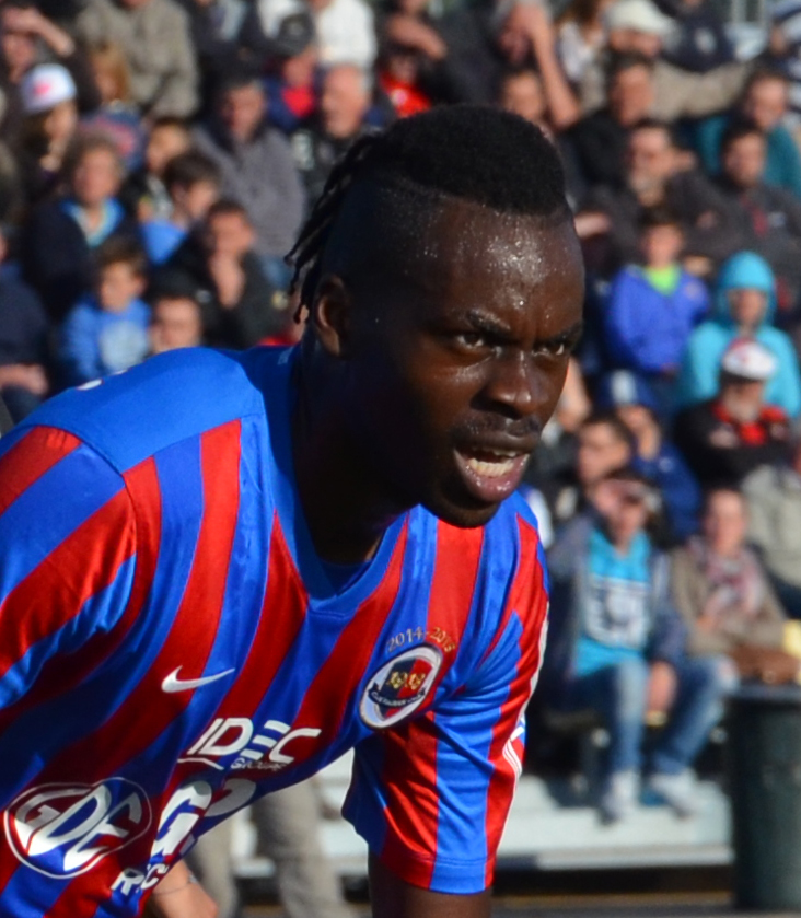 Photographie prise à l'occasion de la rencontre amicale opposant le Stade Malherbe de Caen au Stade rennais, le 9 juillet 2014 au stade Pierre-Comte de Vire. Ici, Yrondu Musavu-King.